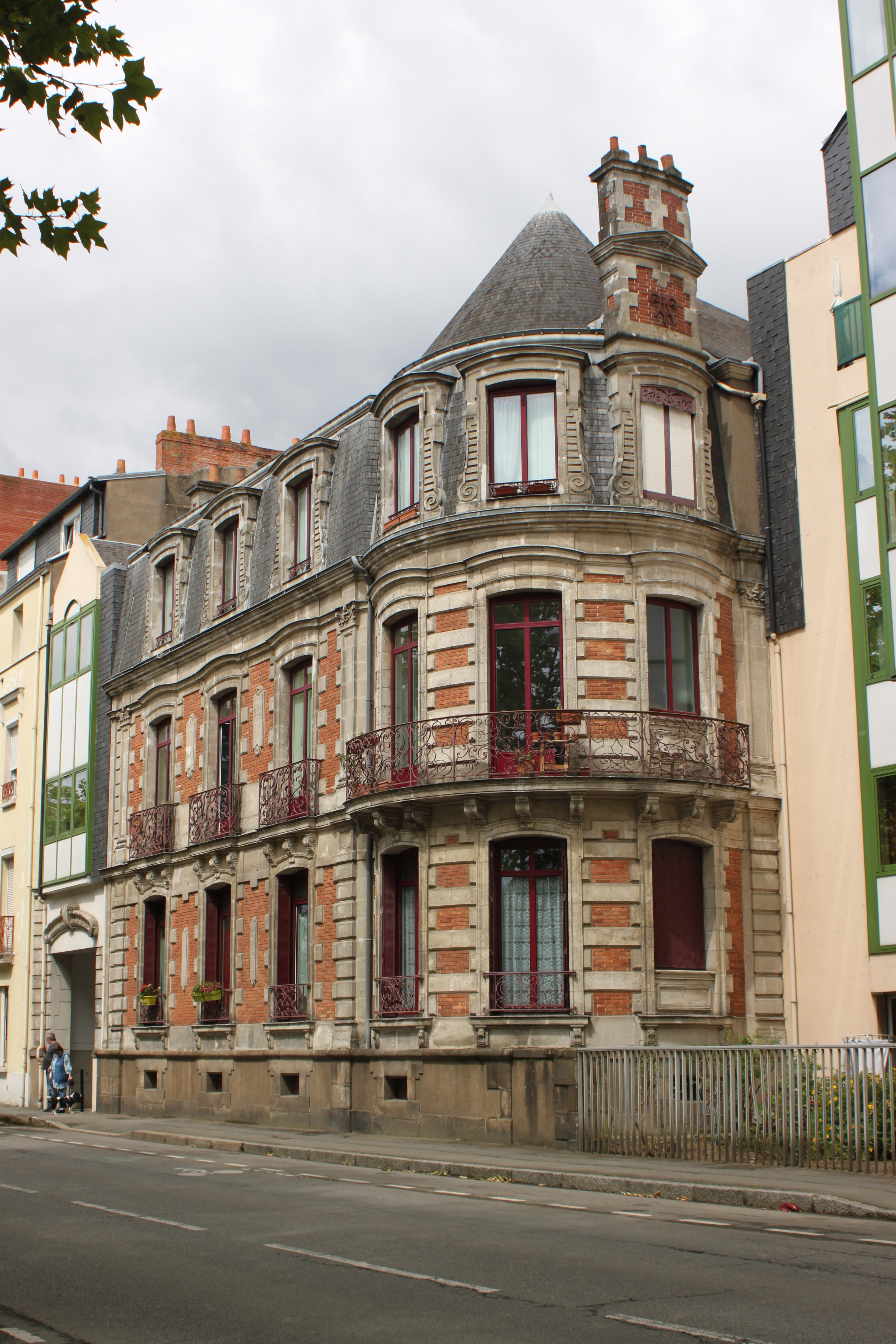 38 quai Magellan, Fr-44-Nantes.